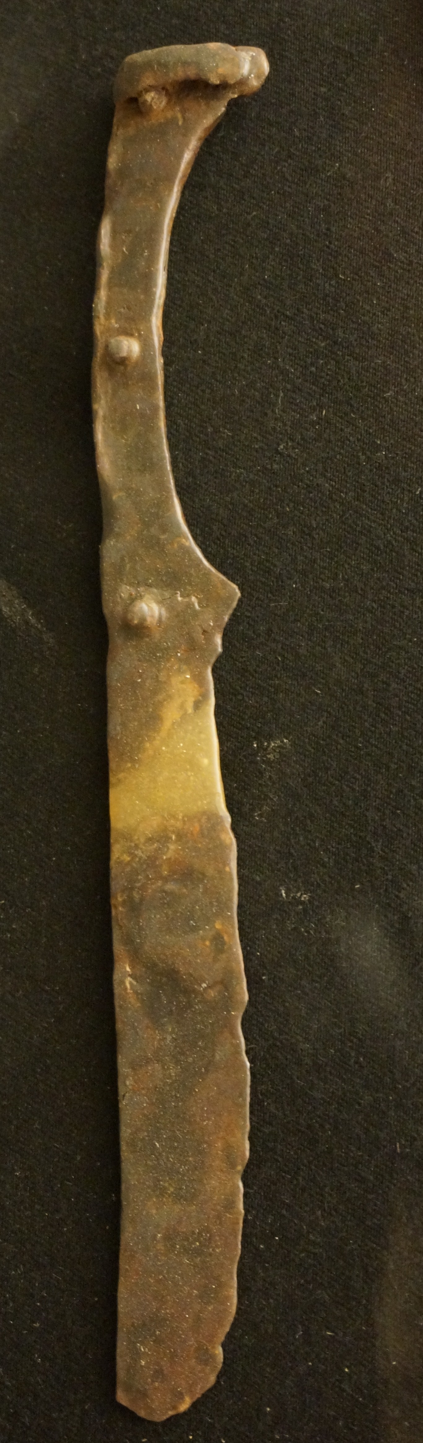 Découvert à Acy-Romance, un couteau du VE siècle avant JC .